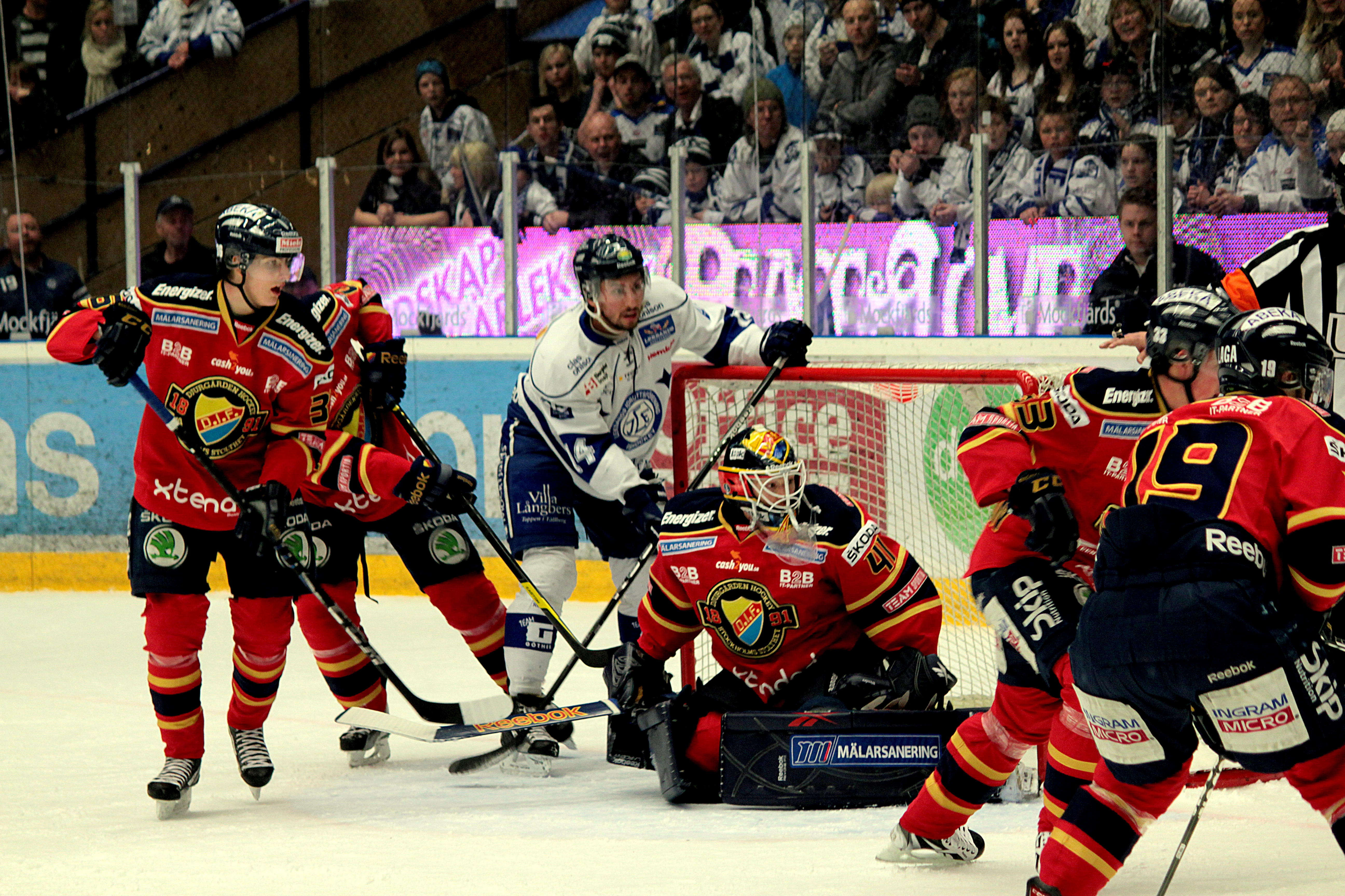 Kval till Elitserien. Leksands IF mot Djurgårdens IF i Leksand 2012-03-31